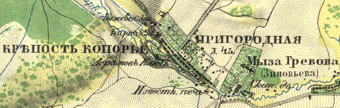 Копрье на карте 1860 года.